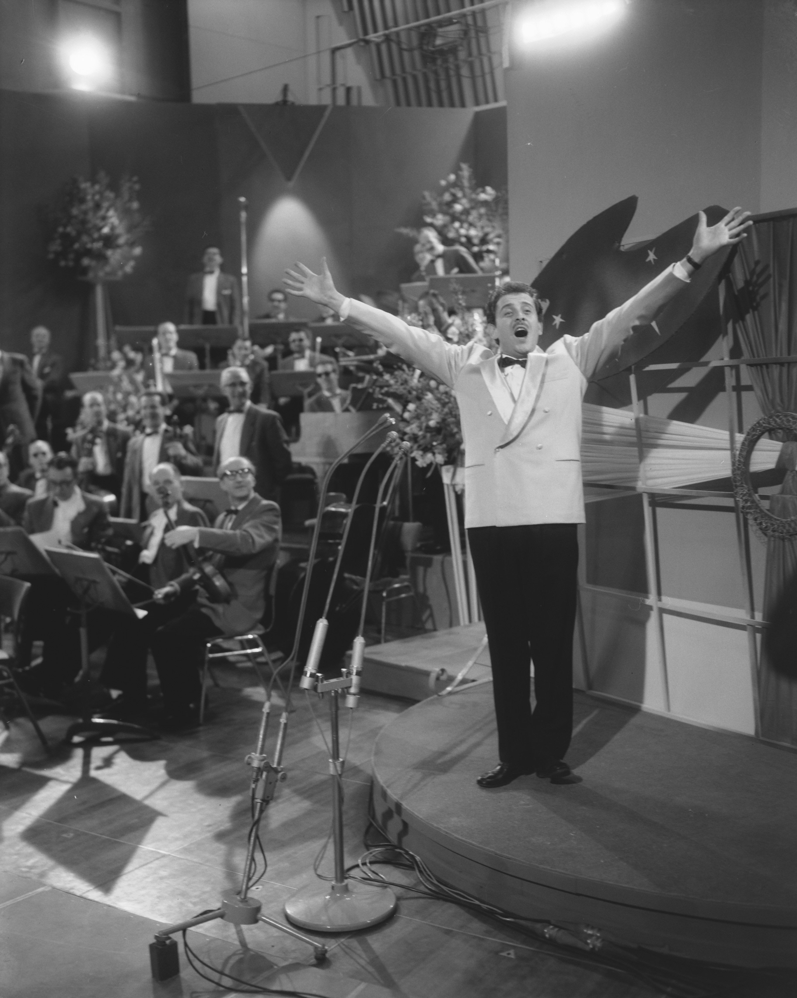 Collectie / Archief : Fotocollectie Anefo Reportage / Serie : Songfestival 1958 Beschrijving : Domenico Modugno Datum : 11 maart 1958 Locatie : Hilversum, Noord-Holland Trefwoorden : songfestivals, zangeressen Persoonsnaam : Brokken, Corry Fotograaf : Pot, Harry / Anefo Auteursrechthebbende : Nationaal Archief Materiaalsoort : Negatief (zwart/wit) Nummer archiefinventaris : bekijk toegang 2.24.01.04 Bestanddeelnummer : 909-4001